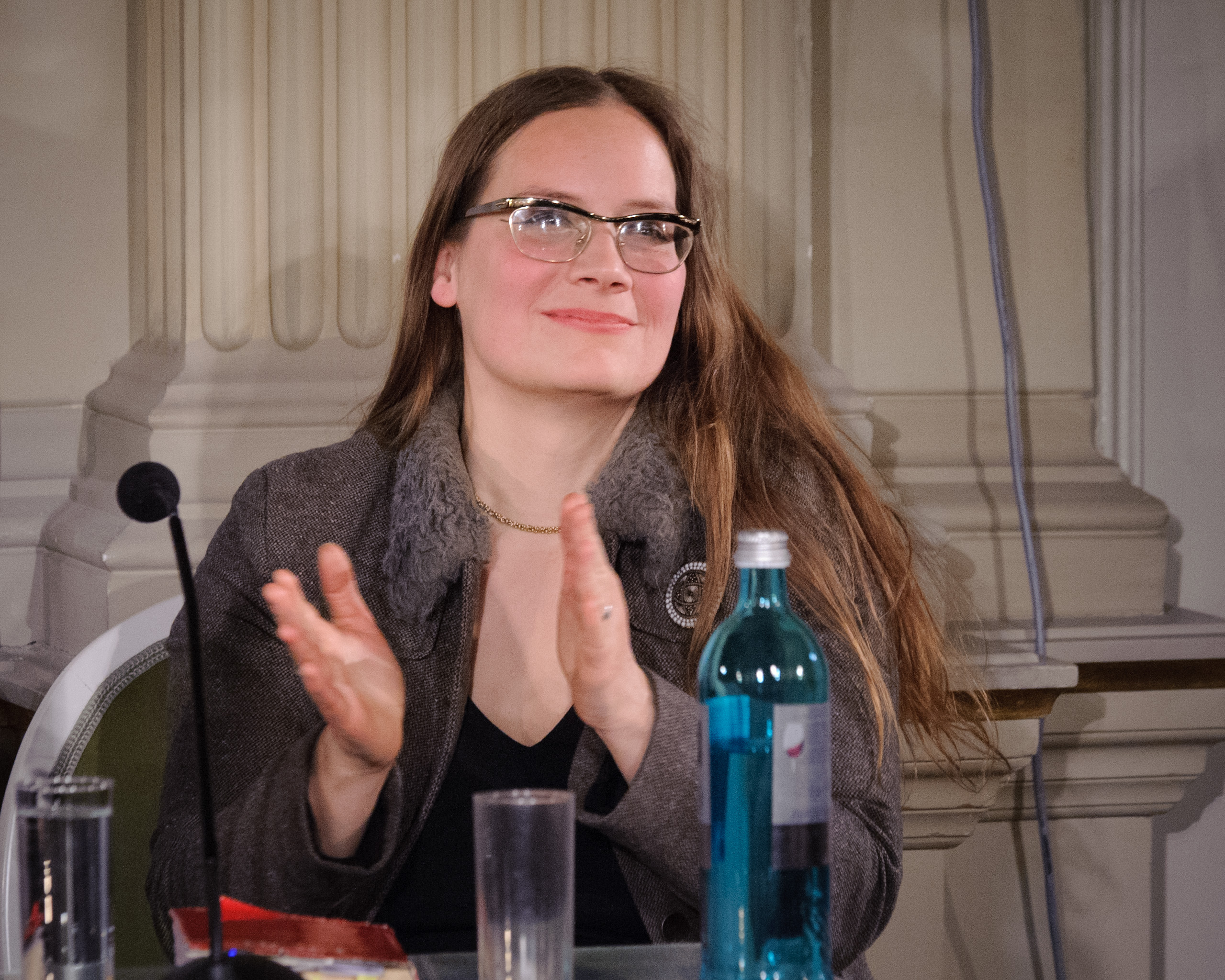 Tanja Dückers (Schriftstellerin) Foto: Stephan Röhl Heinrich Böll gestern und heute Der Literarische Abend „Spezial“ Zu Gast bei Hilal Sezgin und Veronika Peters sind diesmal drei Schriftsteller/innen, die nicht ihre eigenen Romane präsentieren, sondern sich selbst als Leser/innen vorstellen: Mirko Bonné, Tanja Dückers und Christoph Peters haben Texte aus Heinrich Bölls Werk ausgewählt und werden darüber sprechen, warum ihnen dieser Autor wichtig ist, was er für ihr eigenes Leben und Schreiben bedeutet und warum sie der Überzeugung sind: „Man sollte auch und gerade heutzutage Böll lesen!" Eine Kooperation mit Deutsches Theater, Stadtgarten Köln, TAZ